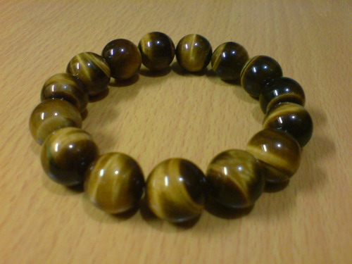 虎眼石的手鍊